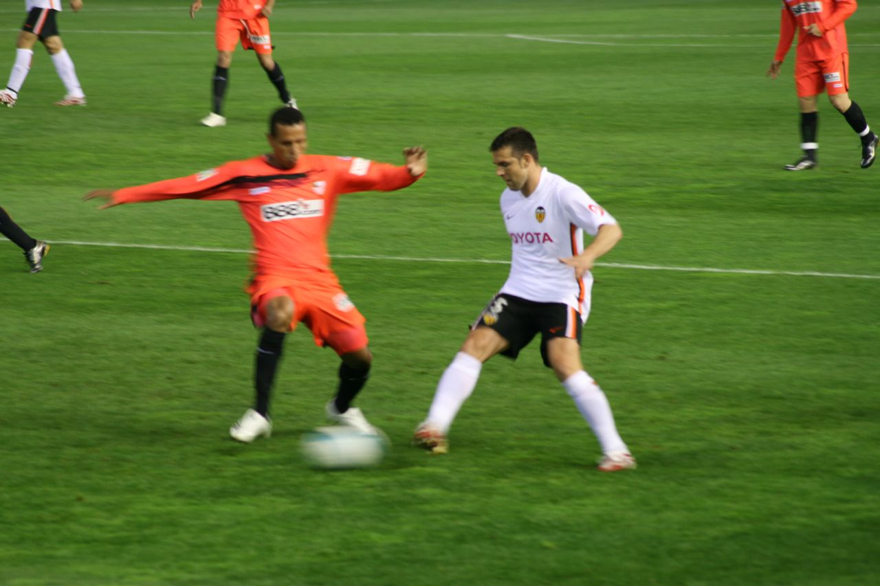 Carlos Marchena i Luis Fabiano a un València-Sevilla de 2007.